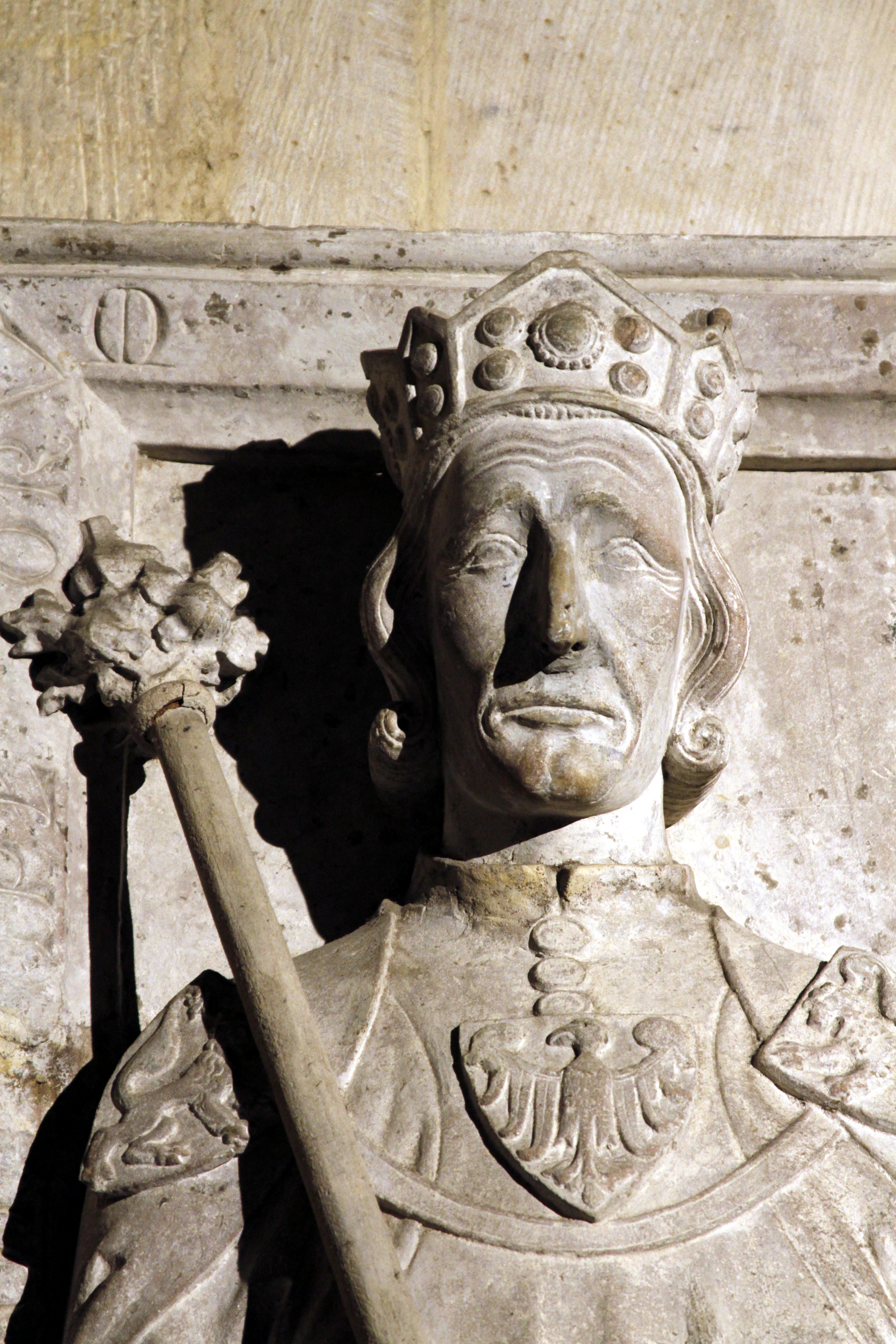 Crypt - Speyer Cathedral - Speyer - Germany